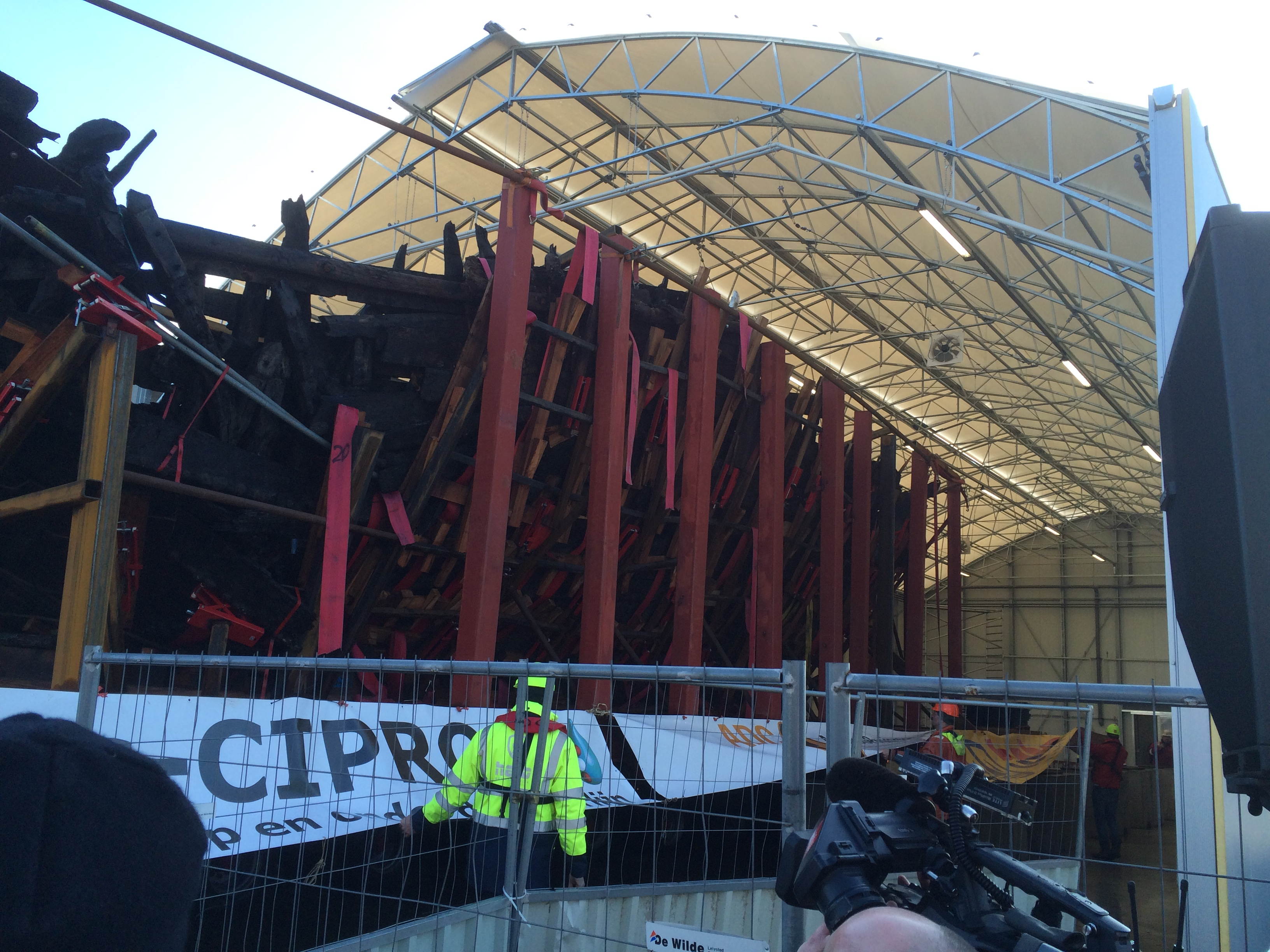 Transport IJsselkogge naar conserveringsstation, Lelystad Nederland